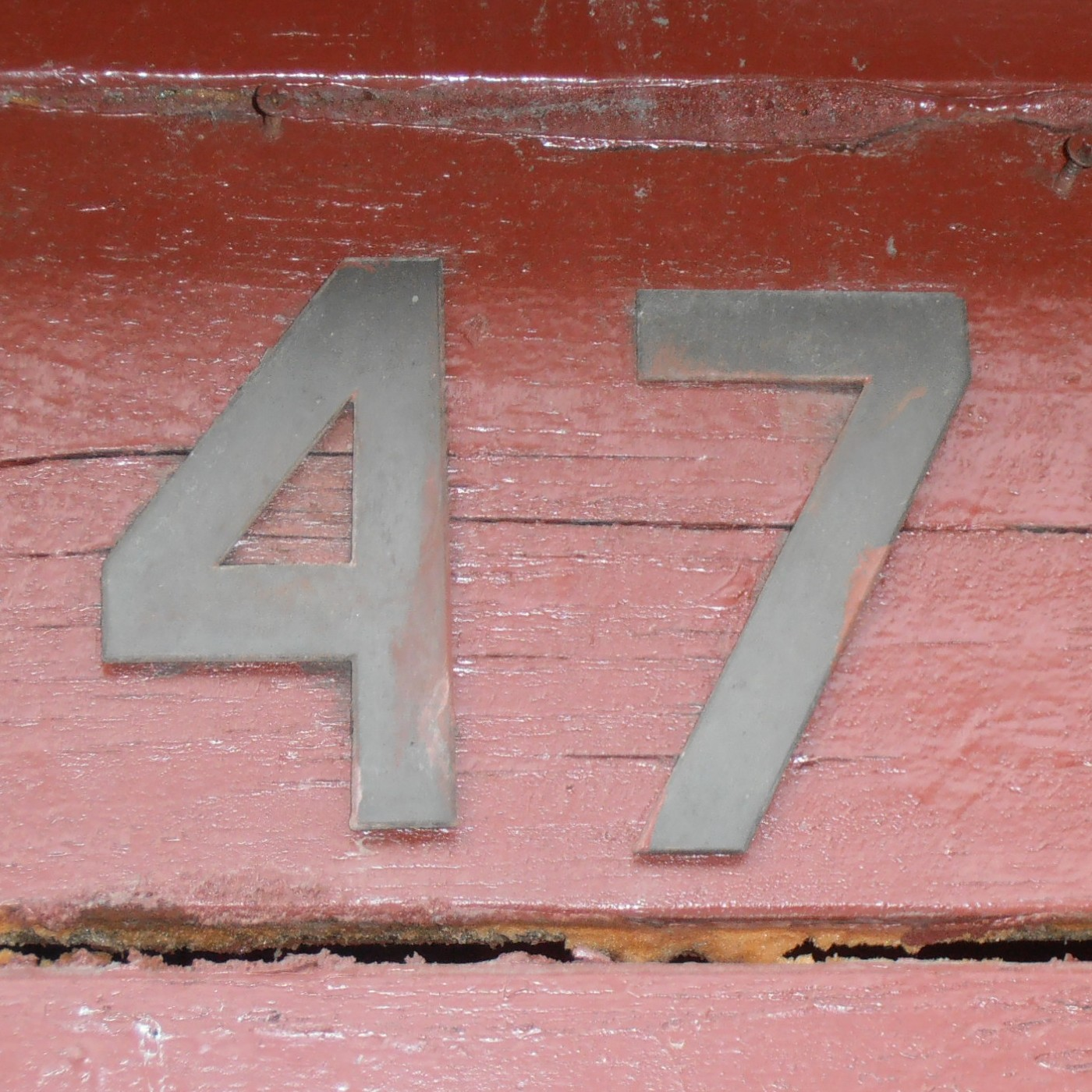 Numer domu 47 gdzieś w Łebie.